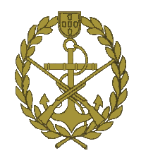 Fuzileiros